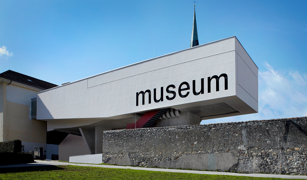 Fassade, Neubau v. 2013 Museum der Völker, St. Martin, im Osten der Stadt